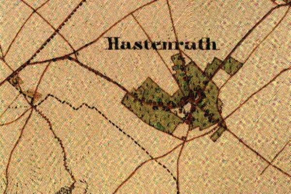 Preußische Kartenaufnahme 1846 -Uraufnahme- (Gangelt)